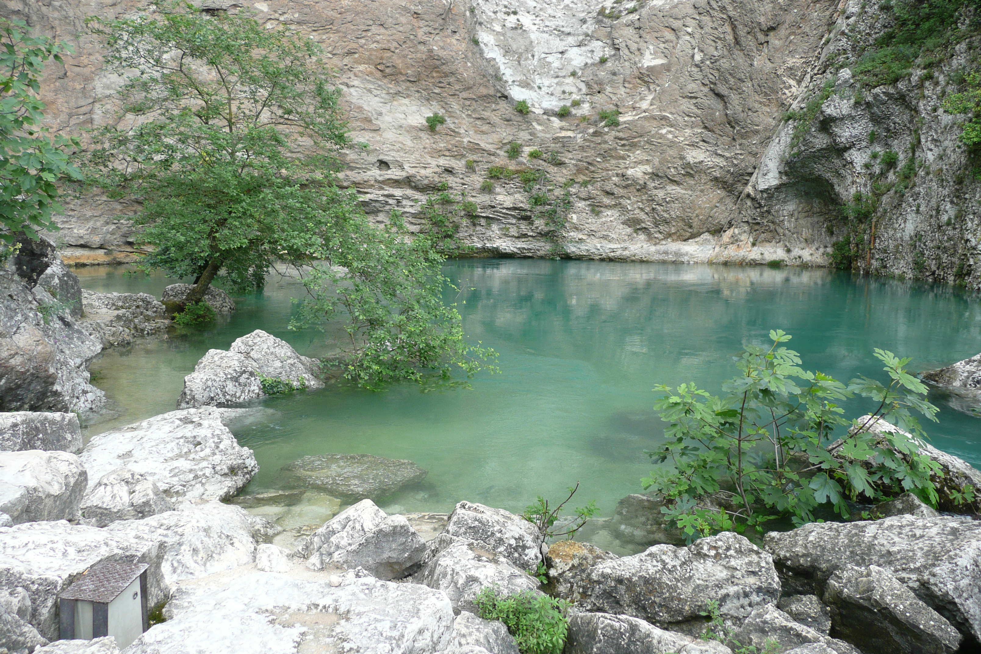 La Sorgue le 31 mai 2008 avec 1,53 mètres de hauteur, La Fontaine de Vaucluse.